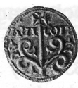 Dinero de Sancho Ramírez de Aragón (reverso) acuñado entre 1085 y 1094. Primera acuñación monetaria de un reino cristiano de la Península Ibérica. Figura la cruz procesional sobre vástago con florituras de ramas a los lados, «arbor ad modum Floris» (mal llamada "Encina de Sobrarbe", como se interpretó desde el siglo XVI) Leyenda a ambos lados del vástago: ARA-GON.